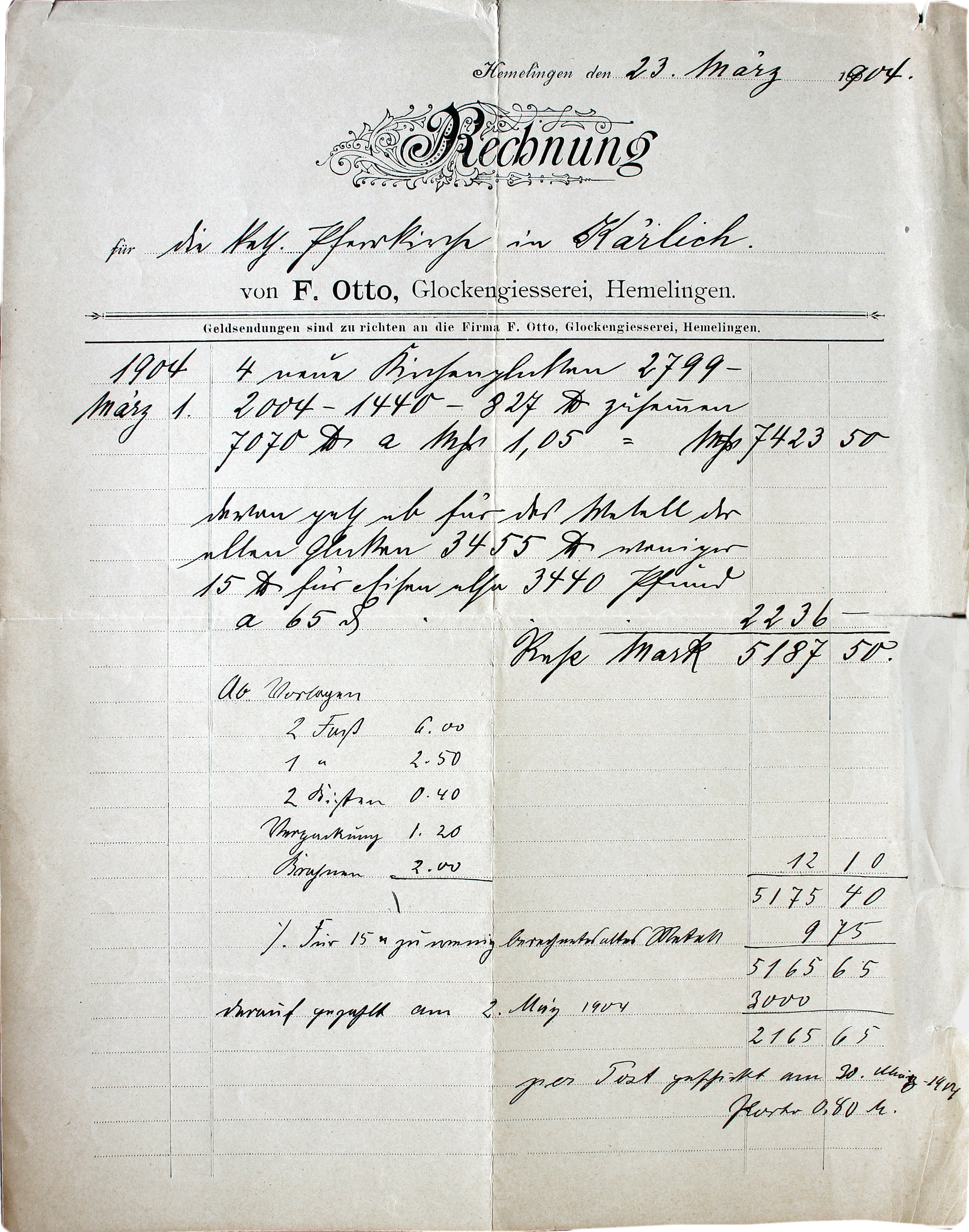 Rechnung der Glockengießerei Otto aus Hemelingen bei Bremen über ein Geläut für die Pfarrkirche St. Mauritius Kärlich vom 23. März 1904